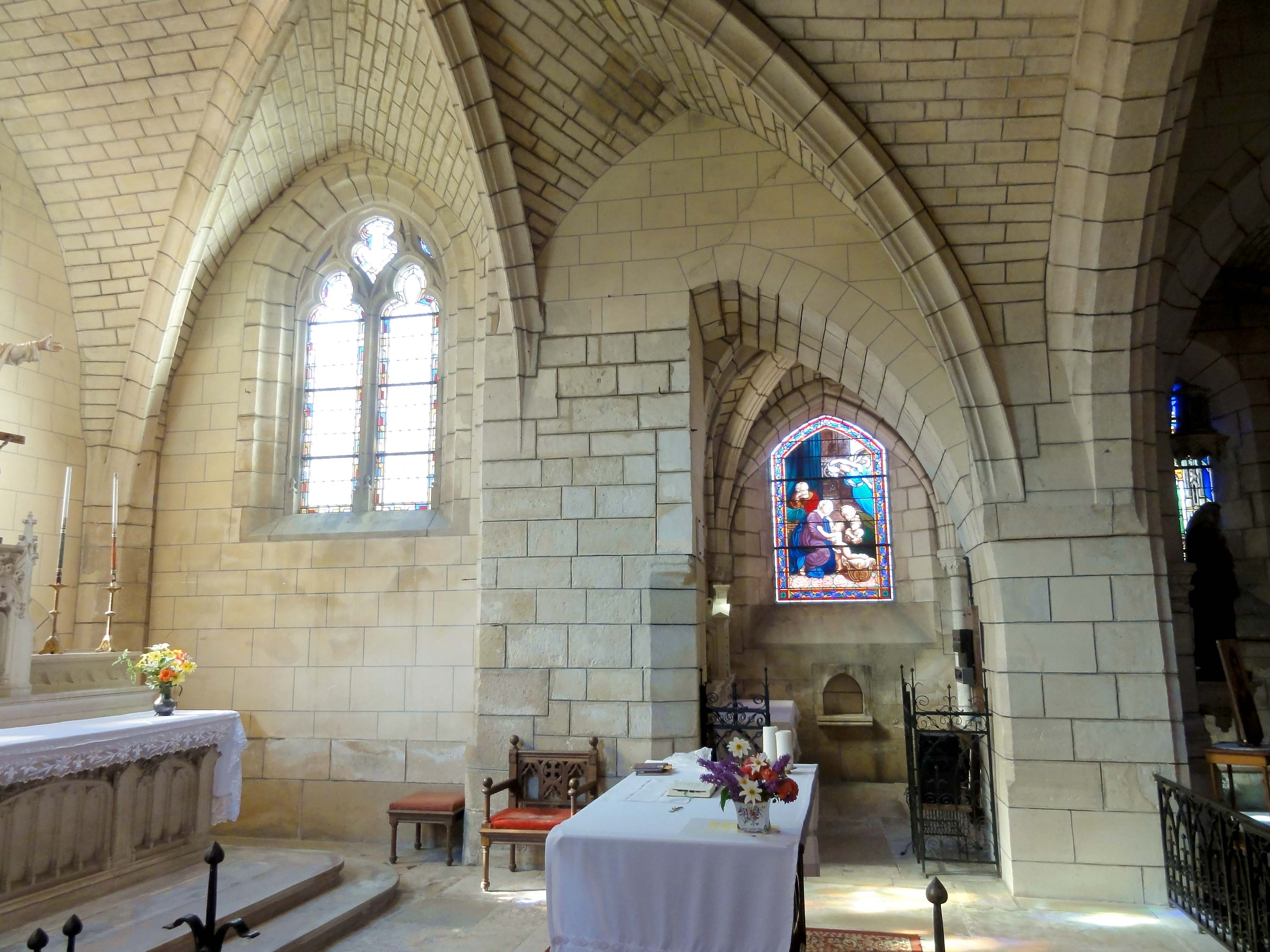 Intérieur de l'église (voir titre).